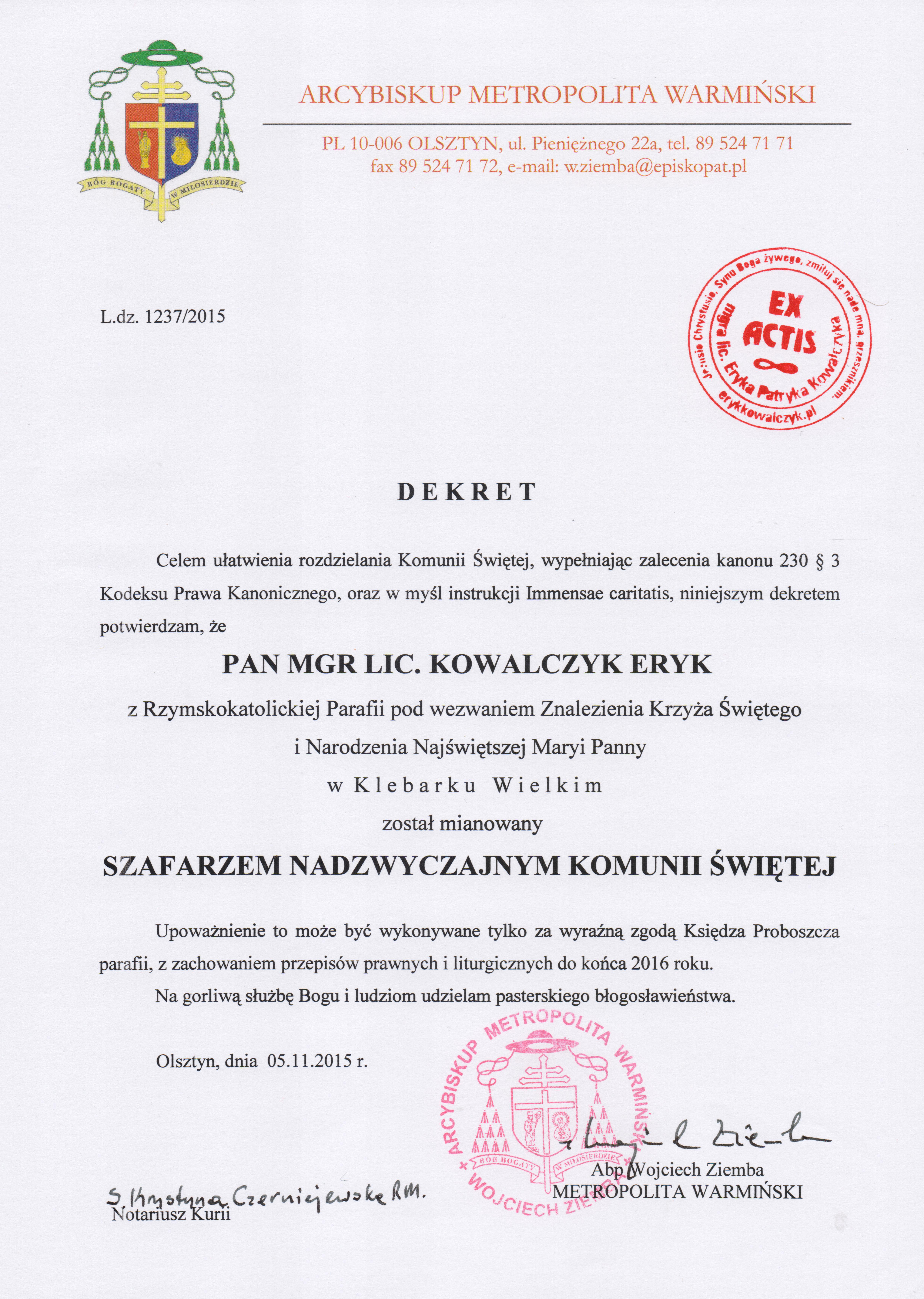 Dekret Szafarza